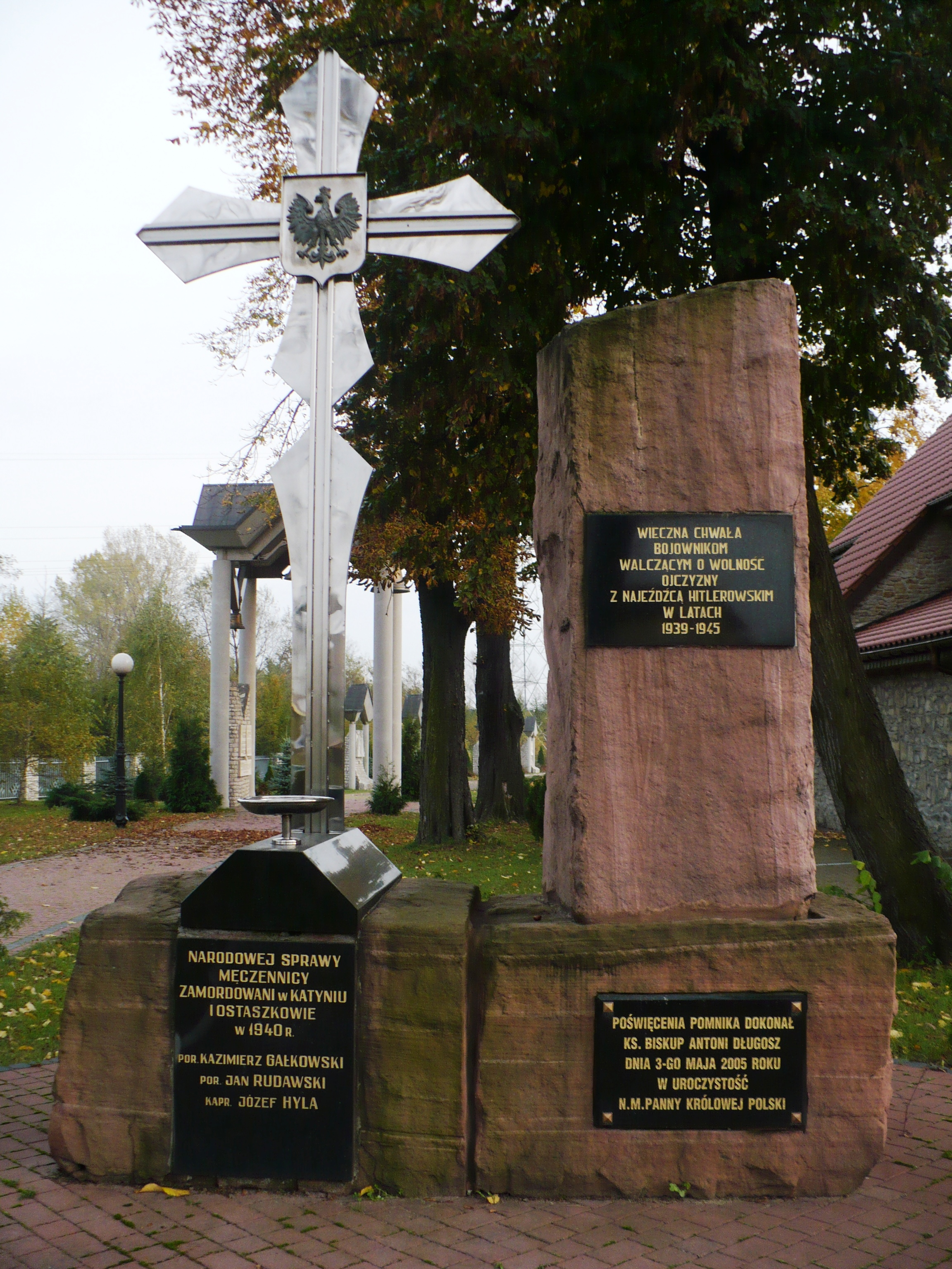 Pomnik zamordowanych w Katyniu i Ostaszkowie mieszkańców Myszkowa i okolic